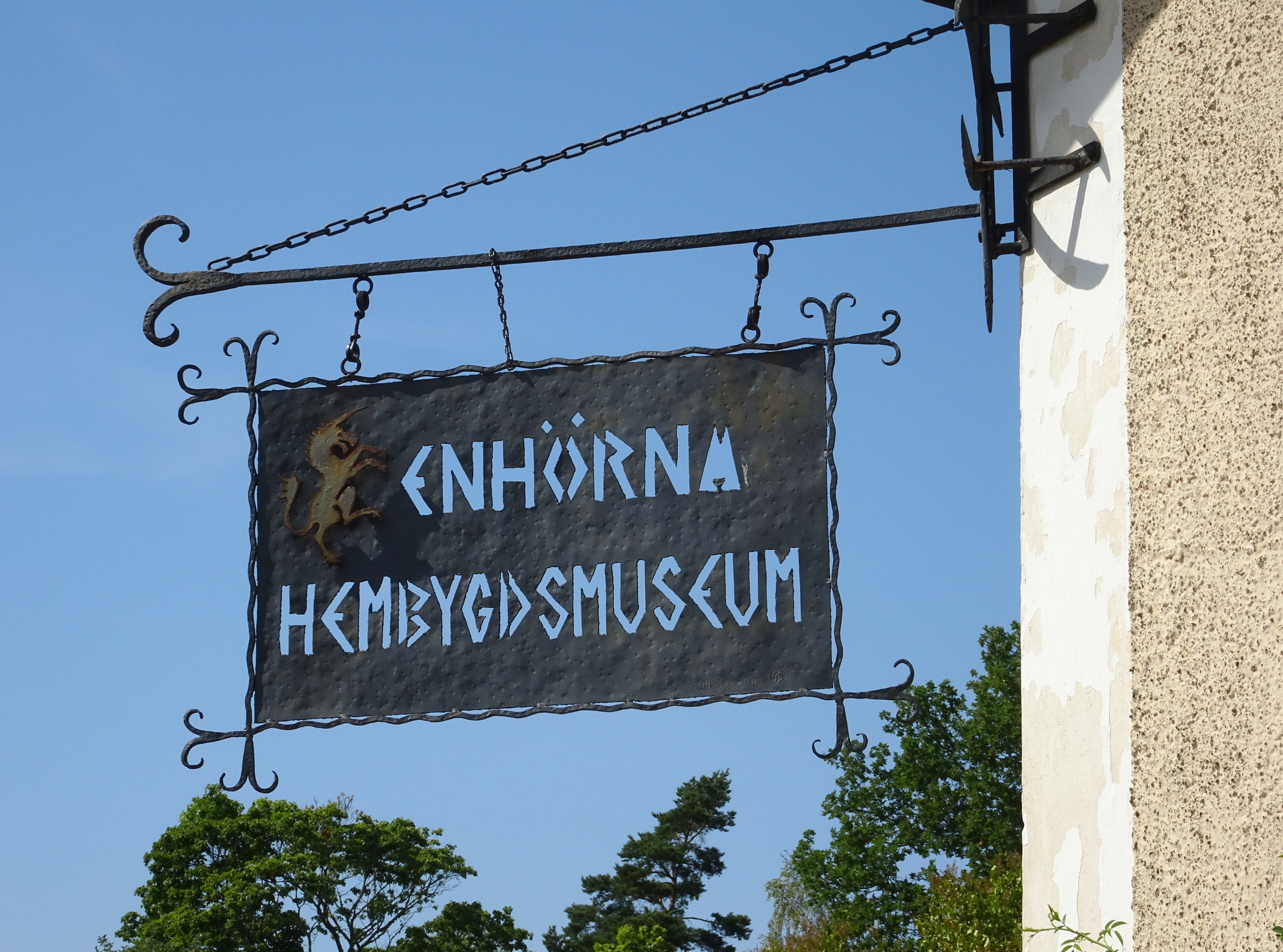 Enhörna hembygdsmuseum, skylt